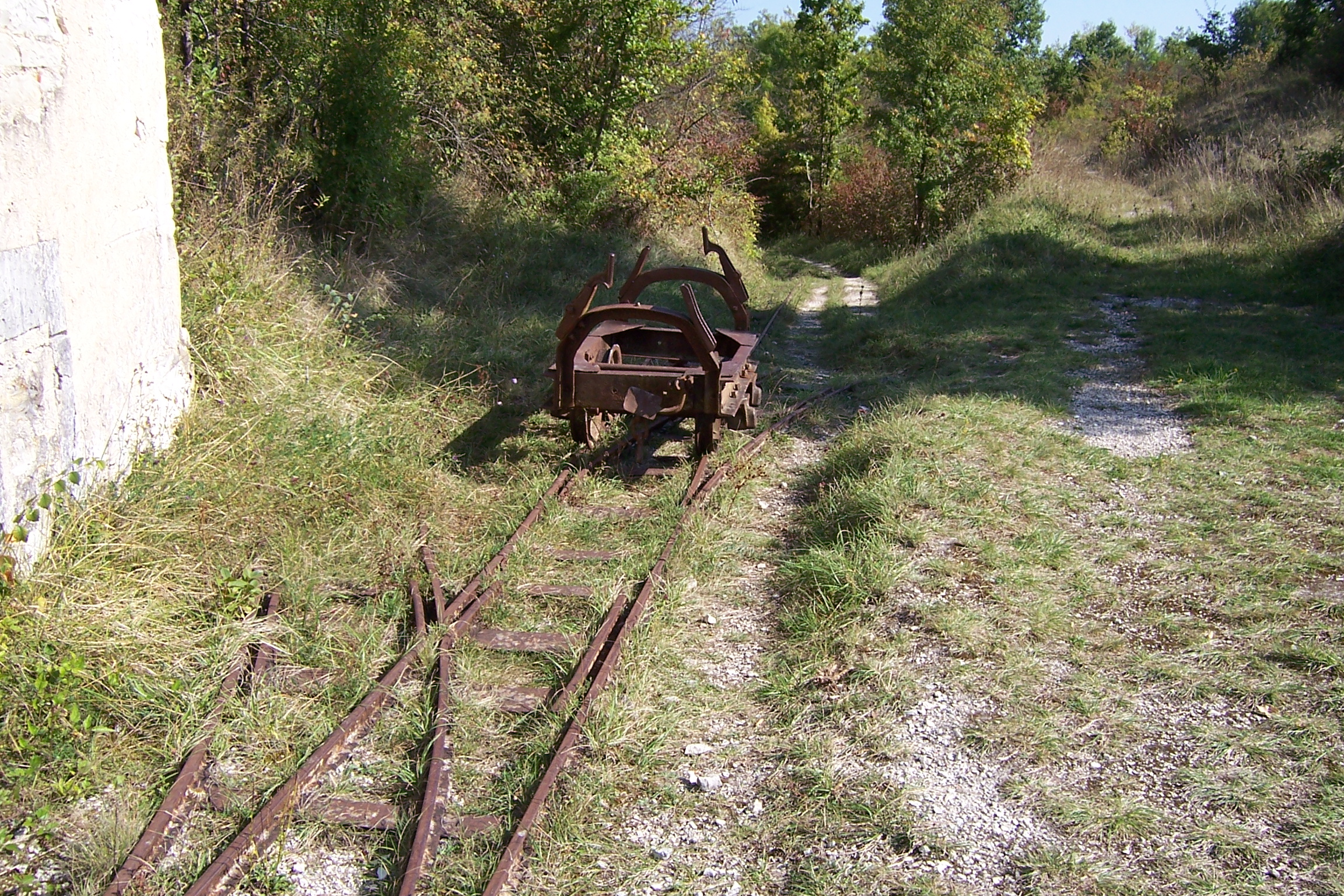 France - Charente - Echoisy - Accès à la carrière